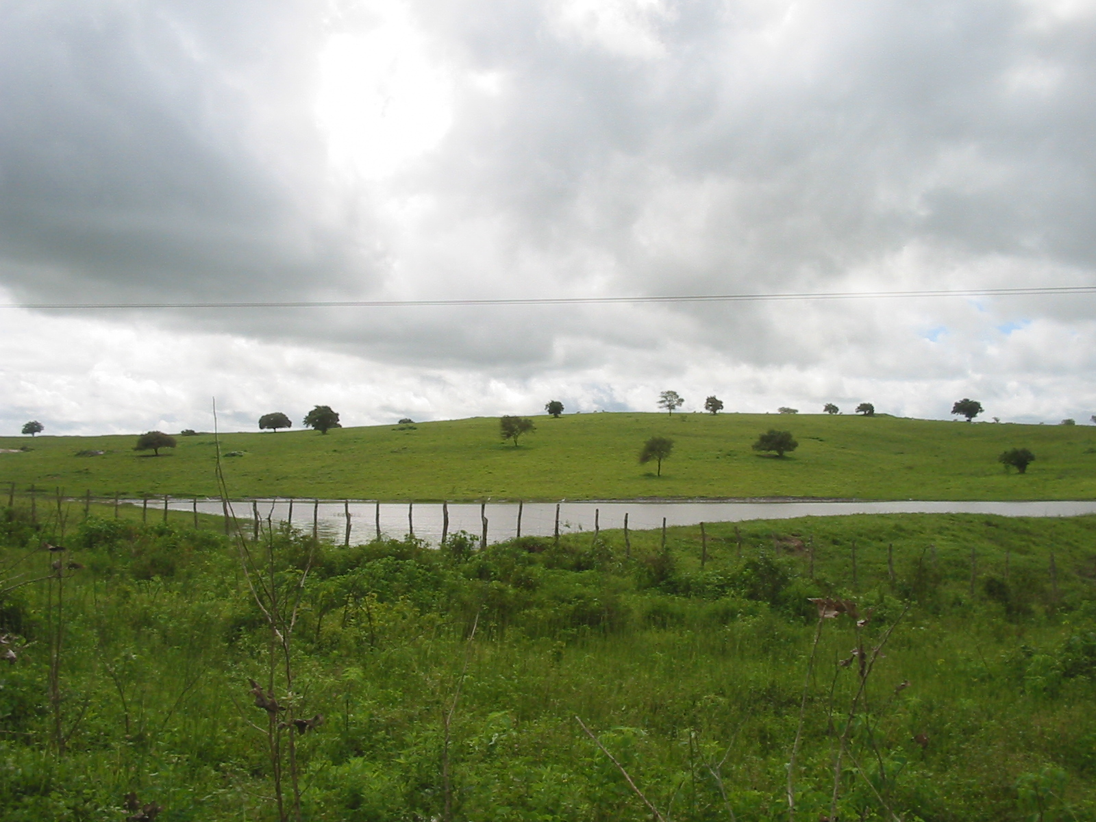 Agrestina (Pernambuco), Brasil. Pastagem na zona rural. Agrestina (Pernambuco), Brazil. Pasture on rural area.